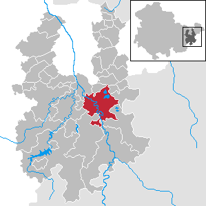 Berga/Elster in Thuringia - District Greiz